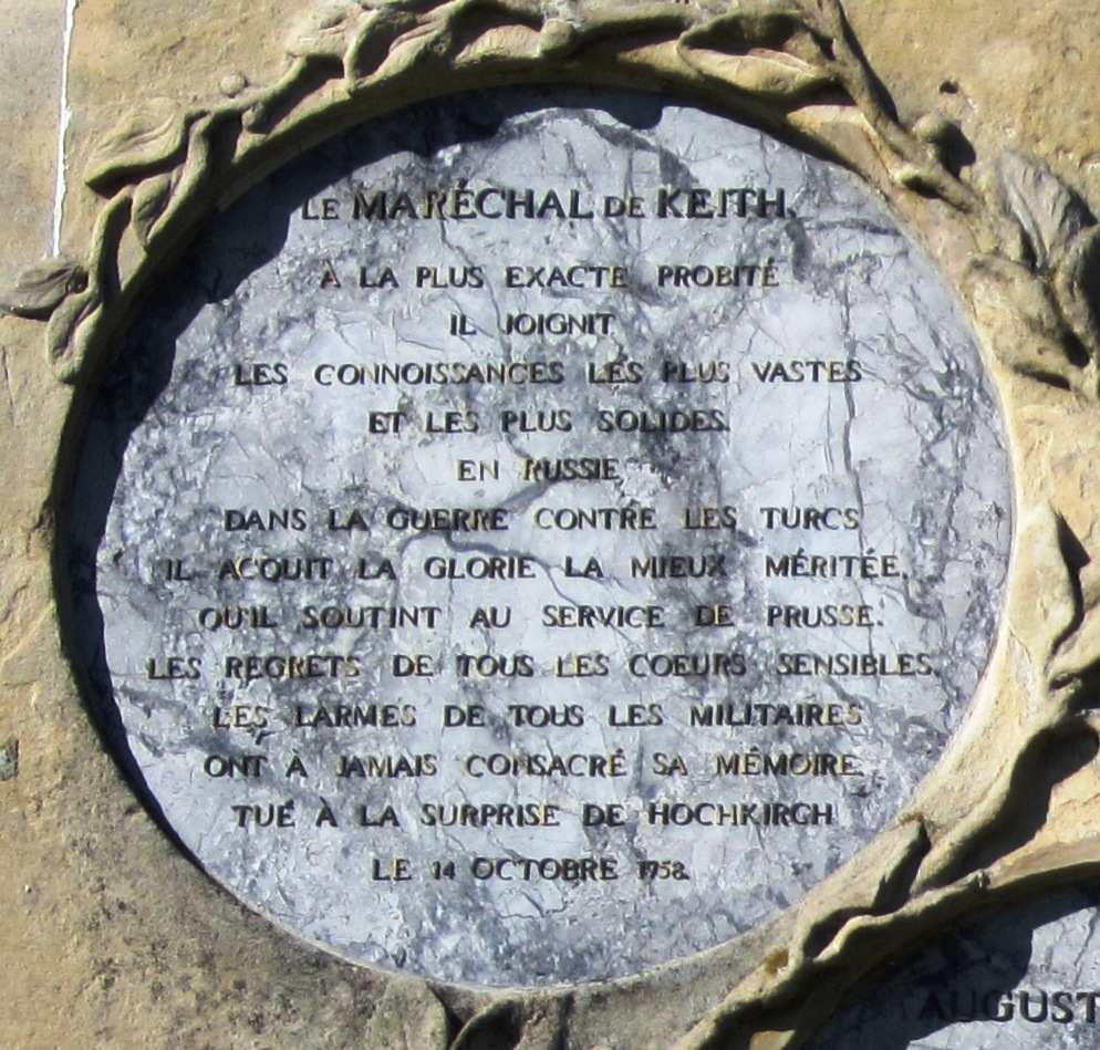 Tafel für James Keith (1696-1758) am Obelisken in Rheinsberg